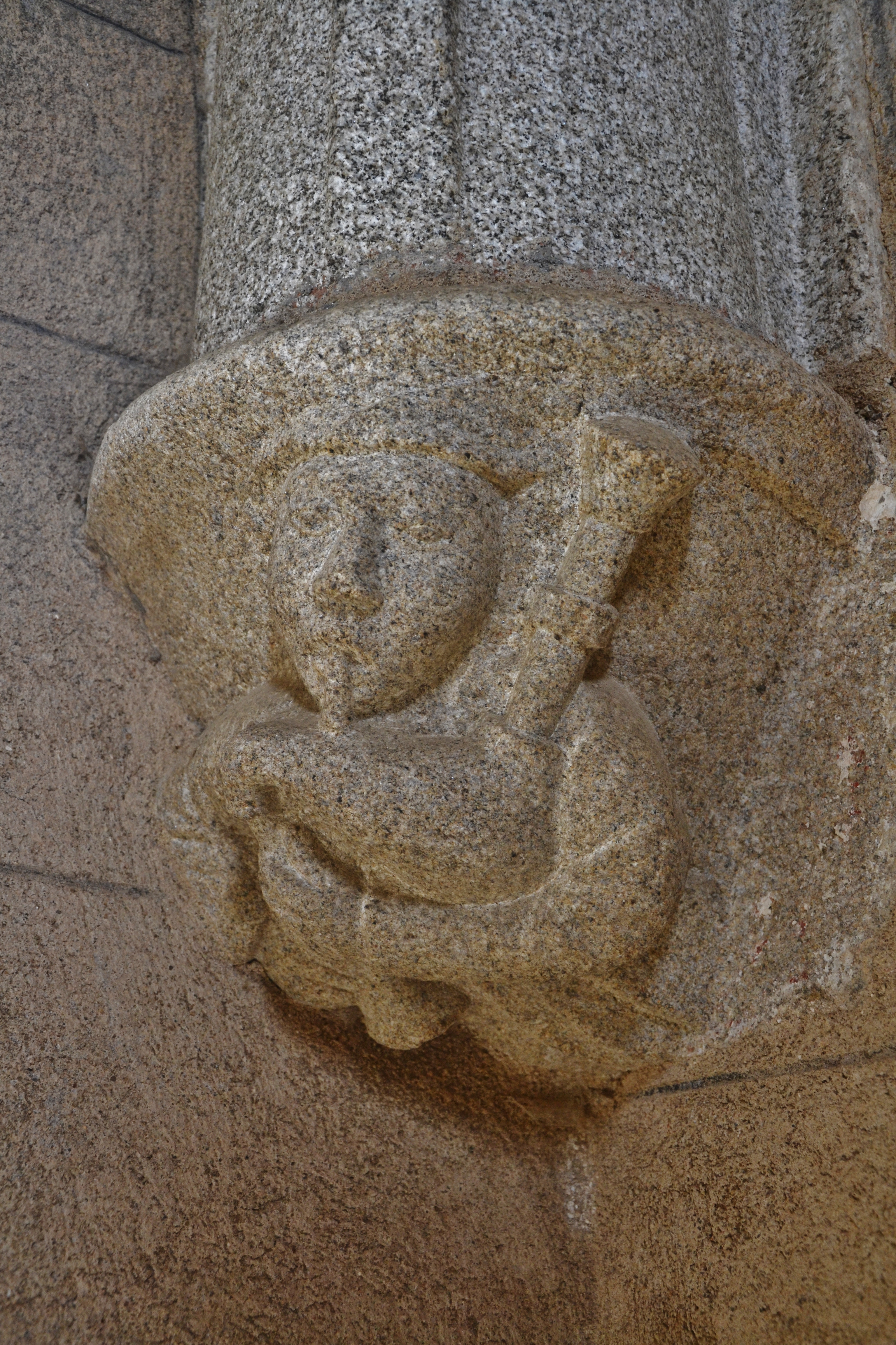 Joueur de cornemuse, détail de l'église du village martyr d'Oradour-sur-Glane (Haute-Vienne, France)